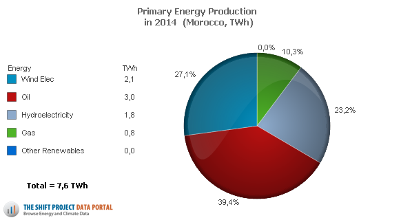 Production d'énergie primaire au Maroc